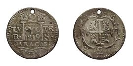 Moneda de dos rals encunyada en 1819 al regnat de Ferran VII d'Espanya. És una peça de plata fabricada a Caracas.